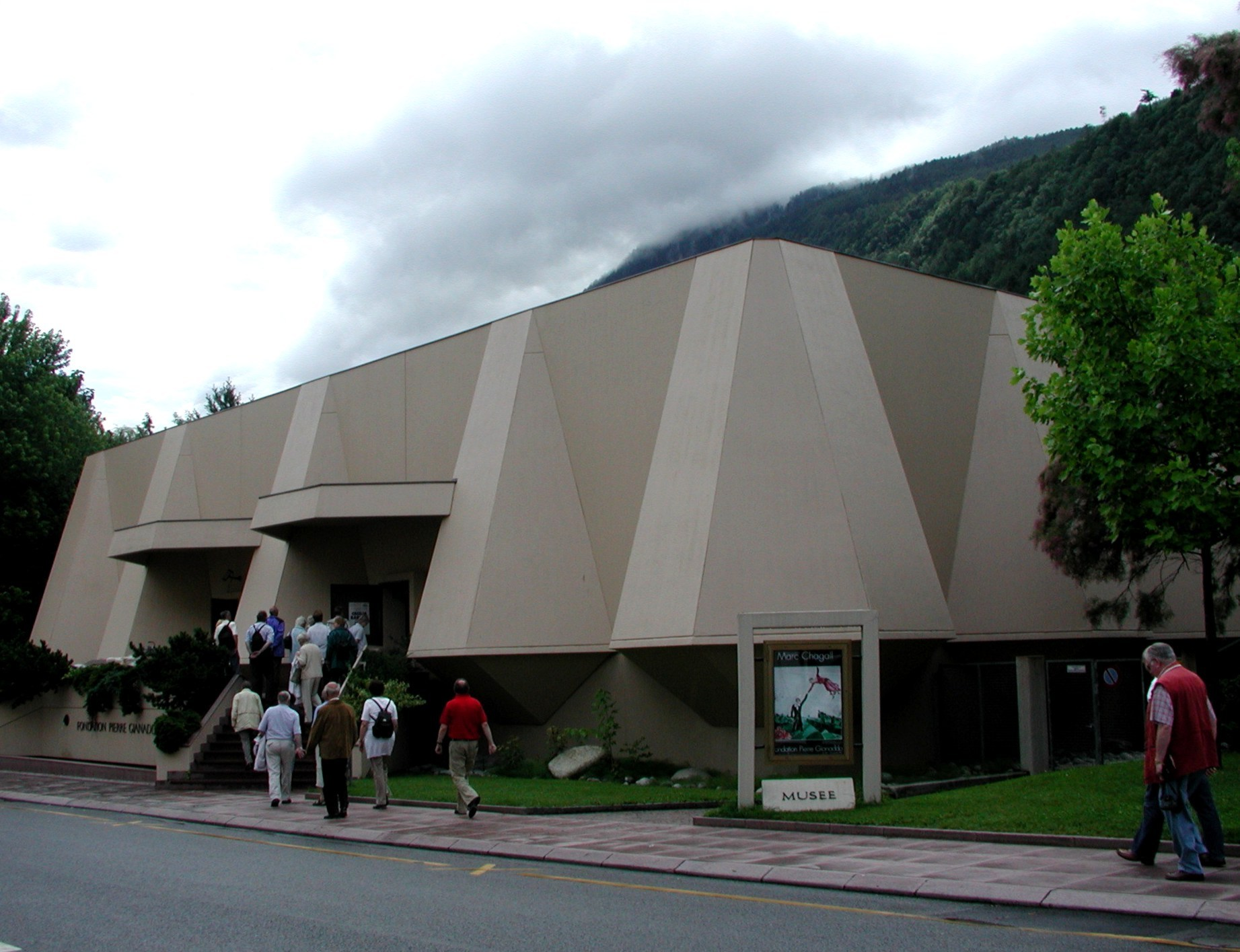 Das Hauptgebäude der Fondation